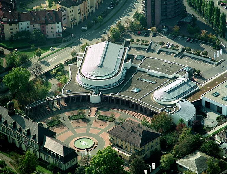 CongressForum Frankenthal - Außenansicht